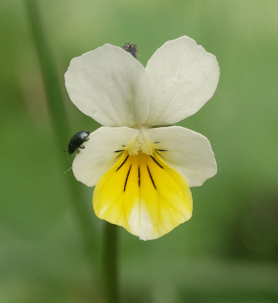 Viola arvensis, Schwäbisch-Fränkische Waldberge, Germany